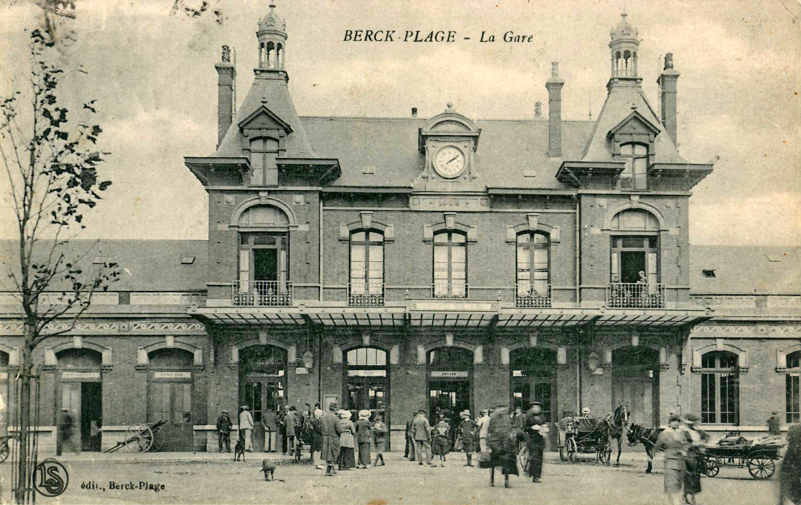 Carte postale ancienne éditée par LS à Berck-Plage, datée du 31 août 1917 :BERCK-PLAGE - La Gare